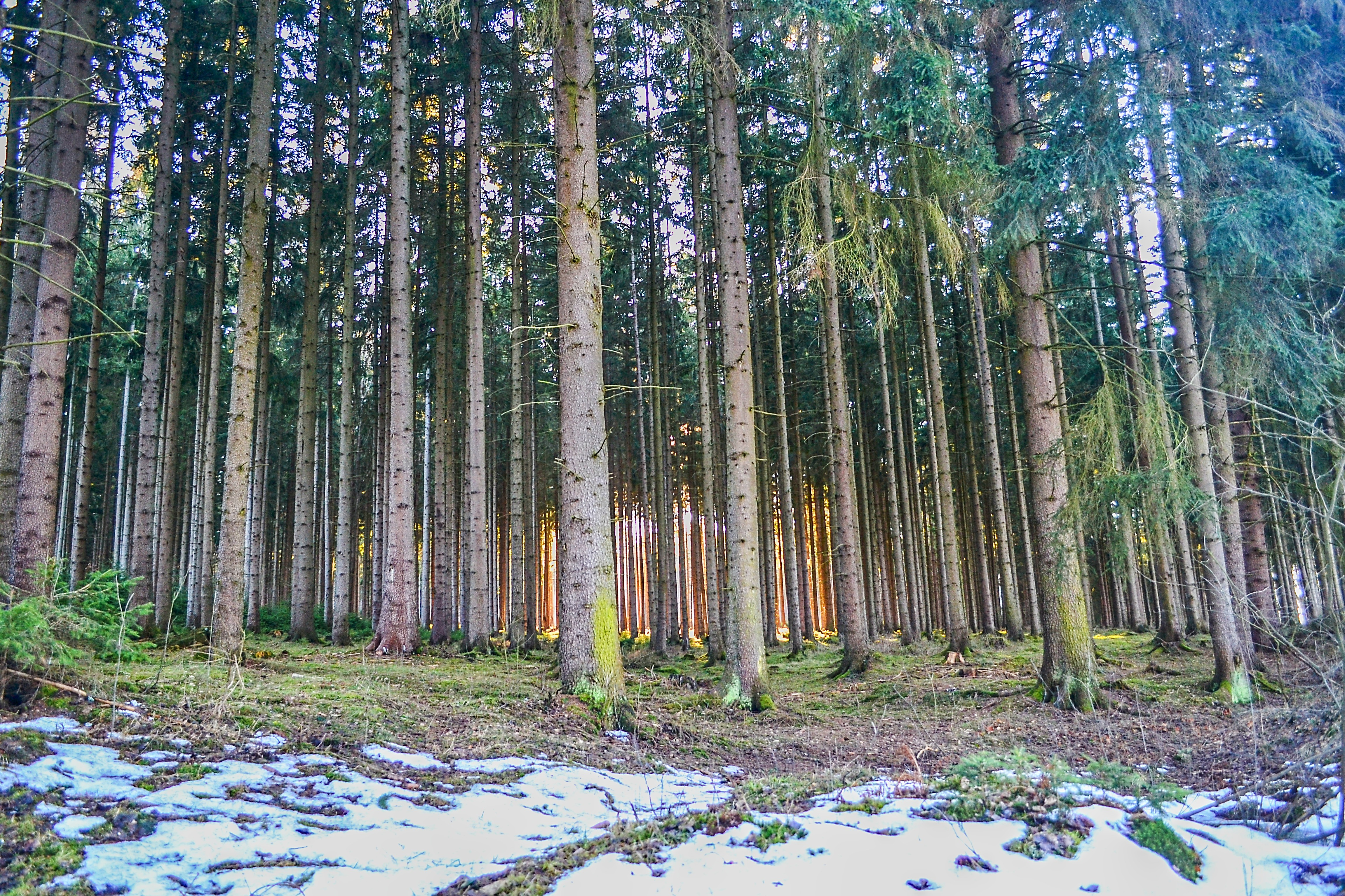 PP Maršovy Chody